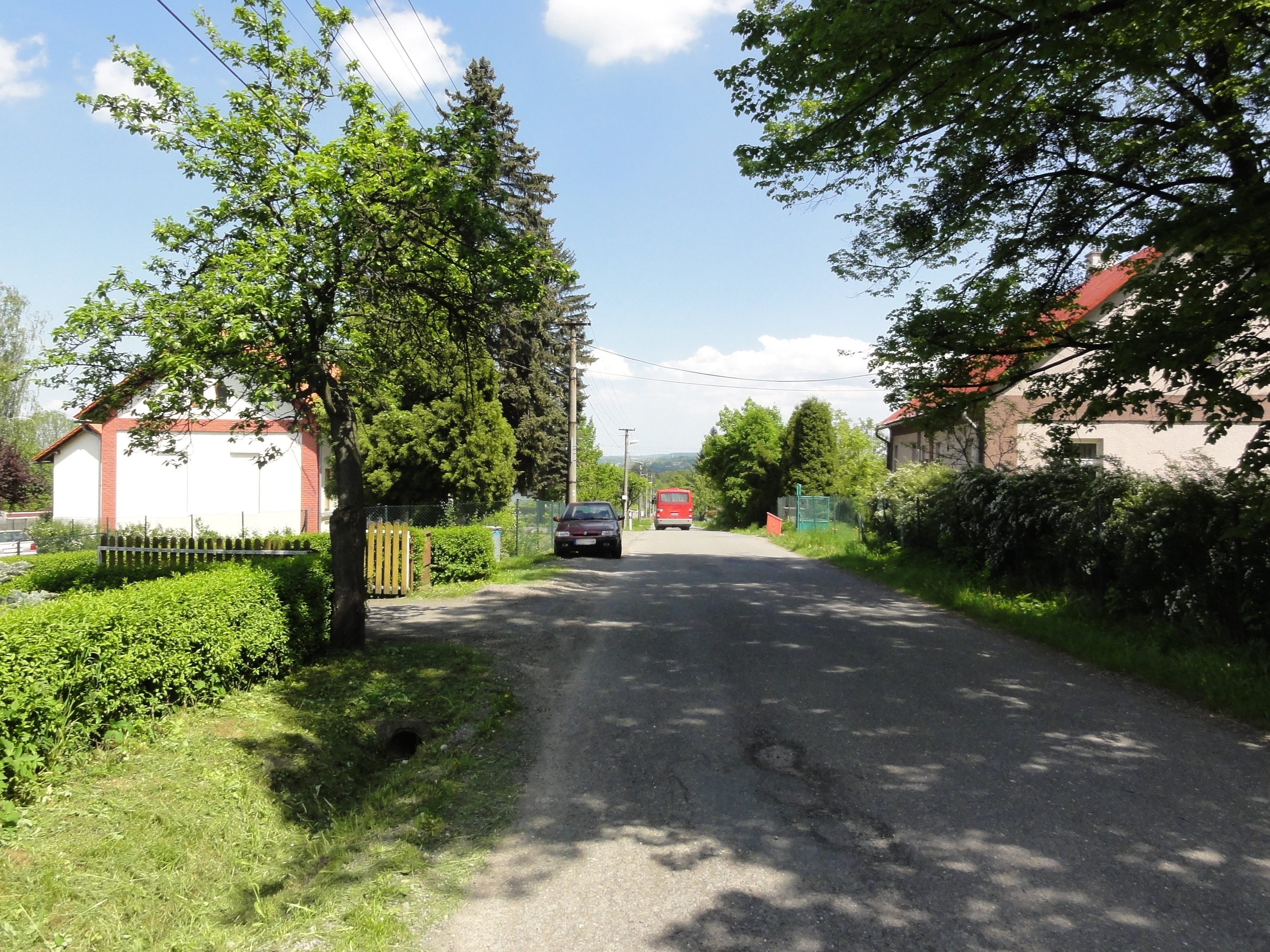 Czeski Cieszyn, Dolny Żuków, ul. Pod Dzwonek, po lewej biblioteka, po prawej przedszkole